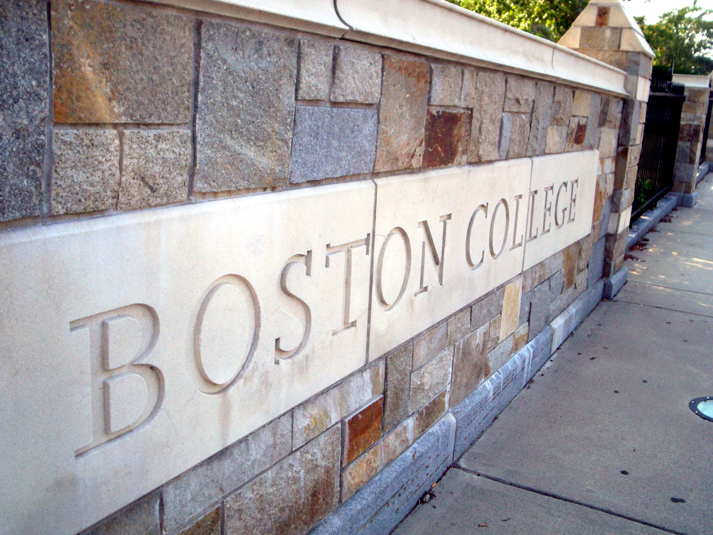 ファイル:Boson College sign.jpg